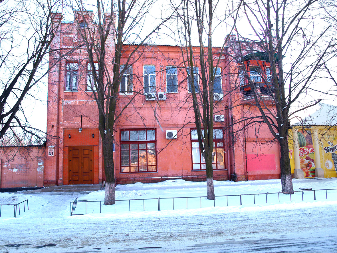 Дом на улице Либкнехта, 51